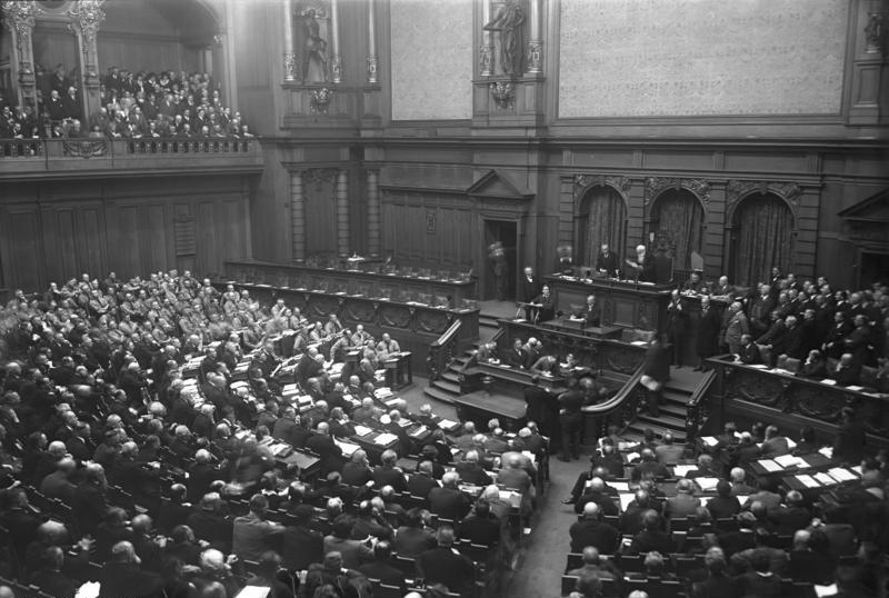 Die Eröffnung des Reichstages. Der Einzug der Nationalsozialisten in den Reichstag in Berlin! Blick in den neuen Reichstag während der Eröffnung durch den 82 jährigen Alterspräsidenten Herold. Rechts im Bilde neben ihm sitzend der Vizepräsident, der Nationalsoialist Hauptmann Göring. Ganz links im Bilde die Nationalsozialisten im braunen Hemd.